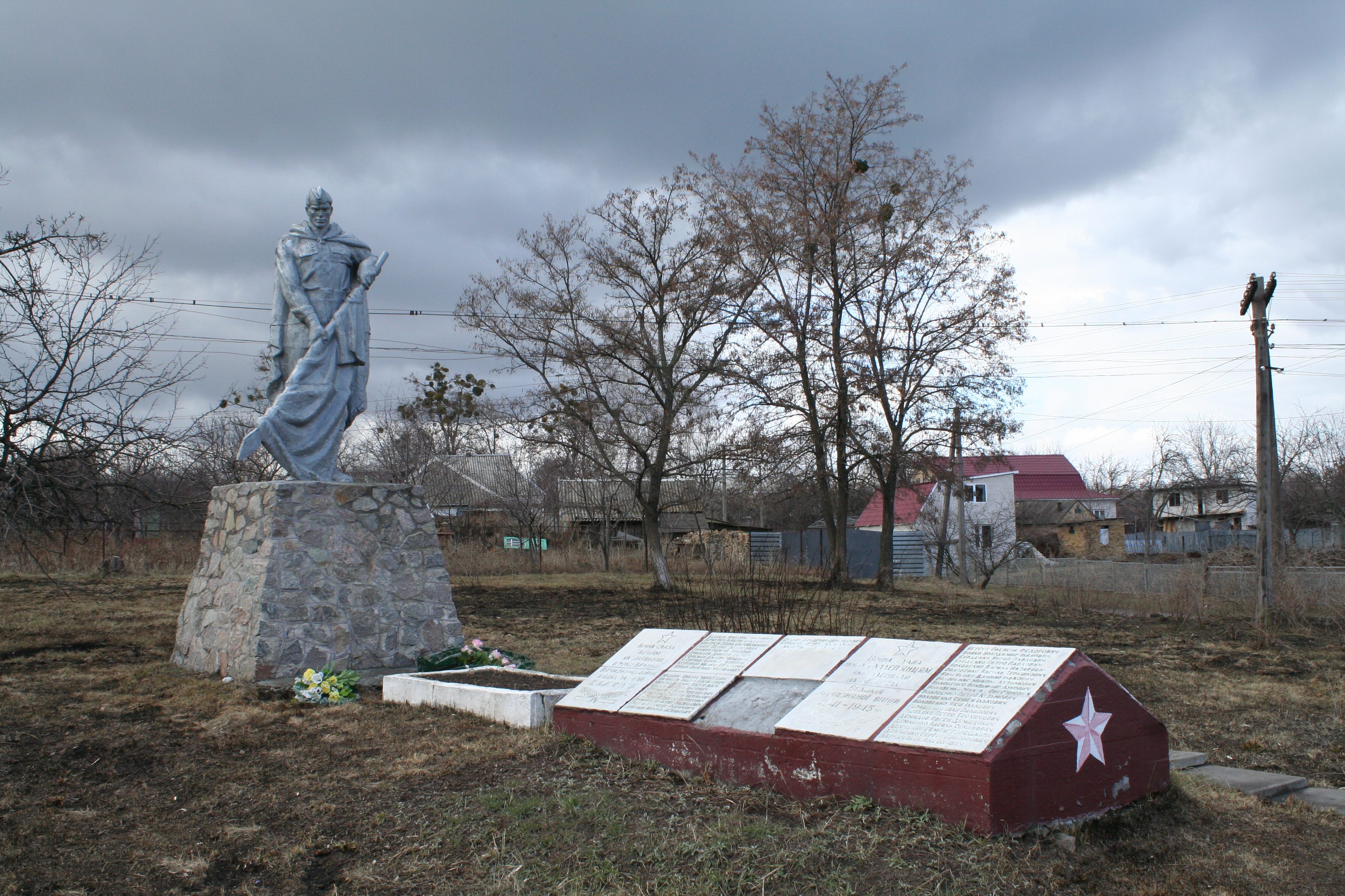 Братська могила воїнів Радянської Армії, які загинули в роки Великої Вітчизняної війни, село Халеп'я, сквер біля сільської ради, вид з дороги